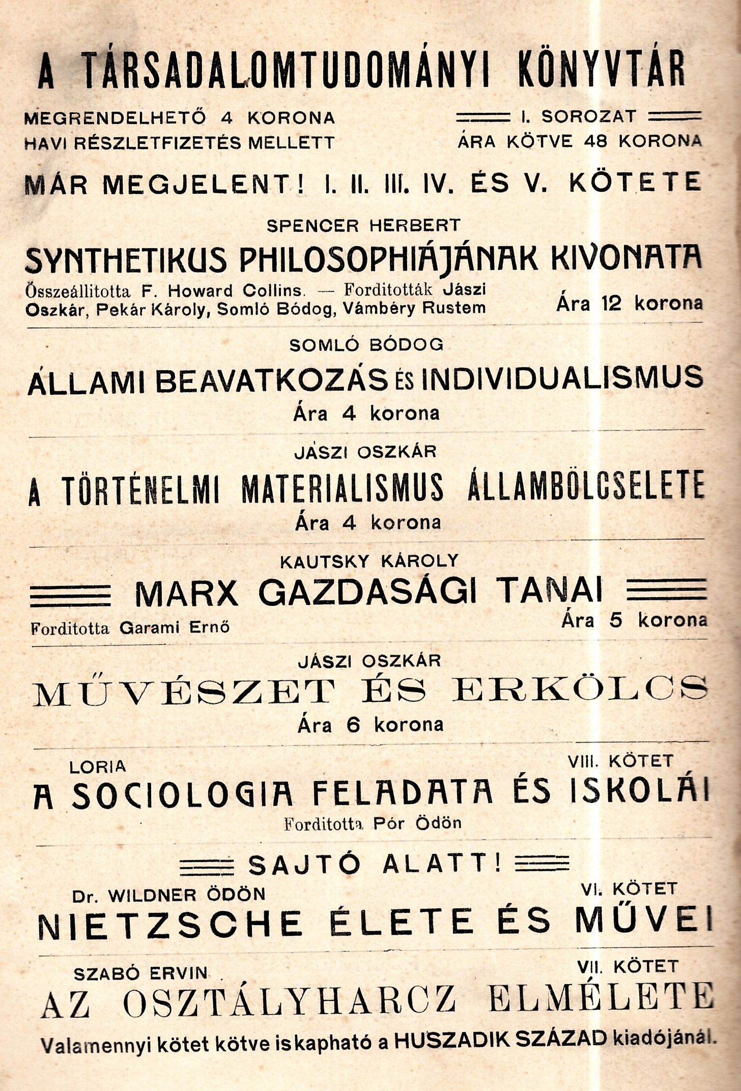 A Társadalomtudományi könyvtár című könyvsorozat korabeli hirdetése (szerző nem ismert, 1900-as évek eleje)